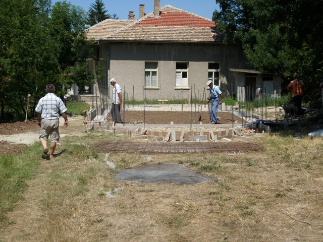 Етап от строителството на православния църковен храм "Св. пророк Илия" на село Долец, община Попово - 11 юли 2008 год. Фото: Вл. Стойков